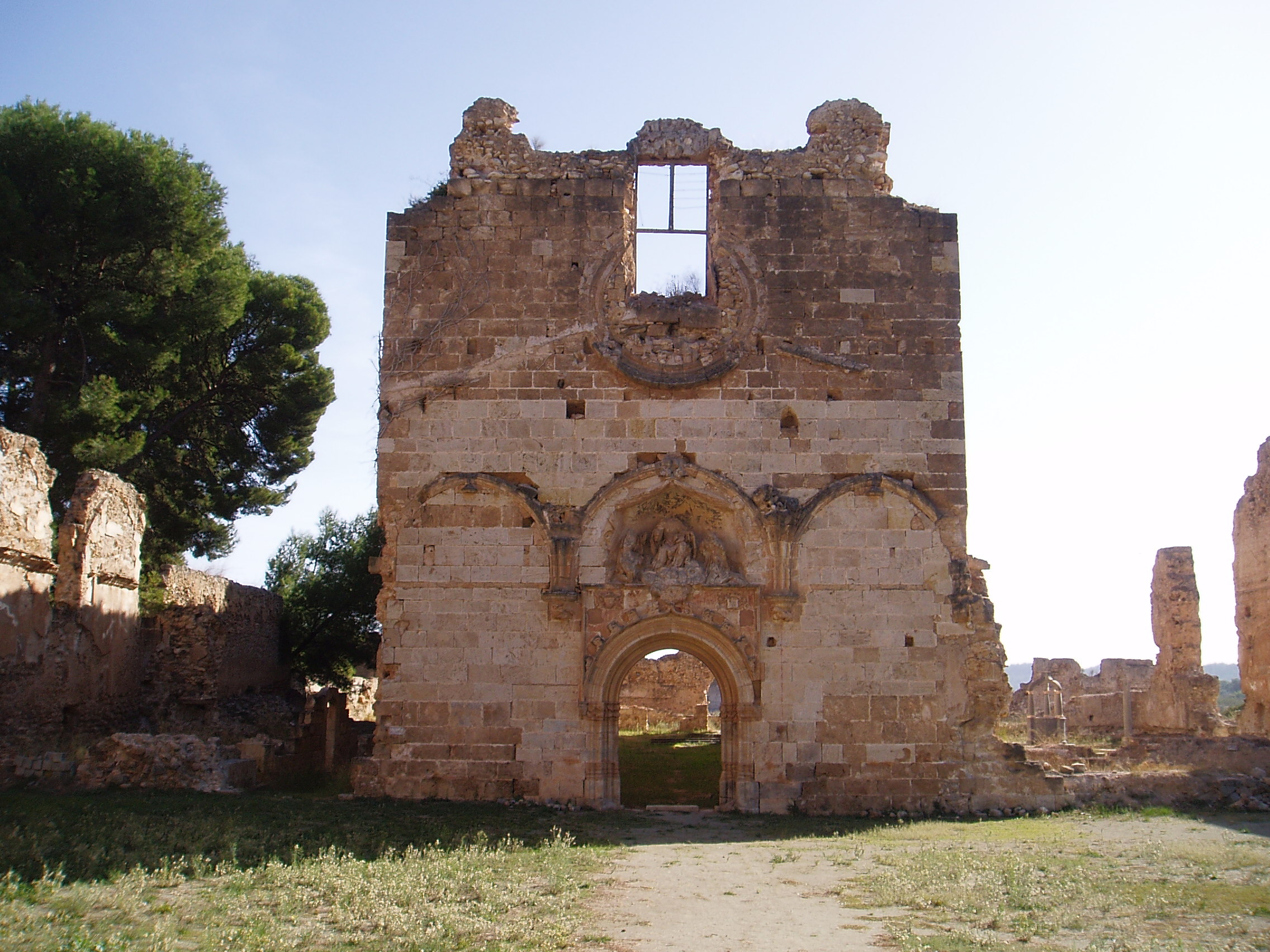 Fachada de la Cartuja de Vall de Crist, Altura, Castellón